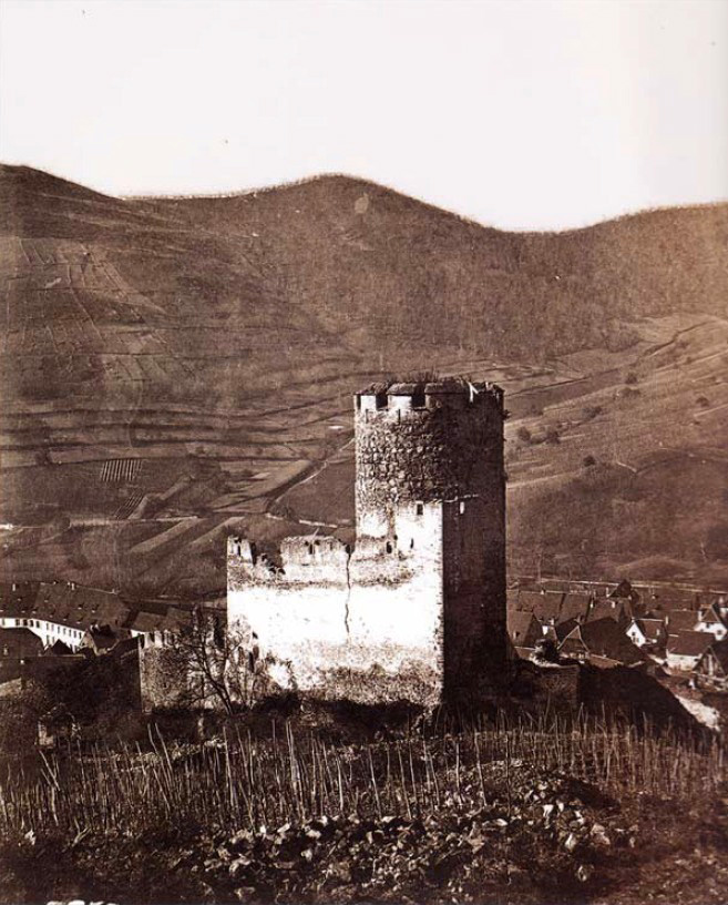 Ansicht der elsässischen Burg Kaysersberg von Norden